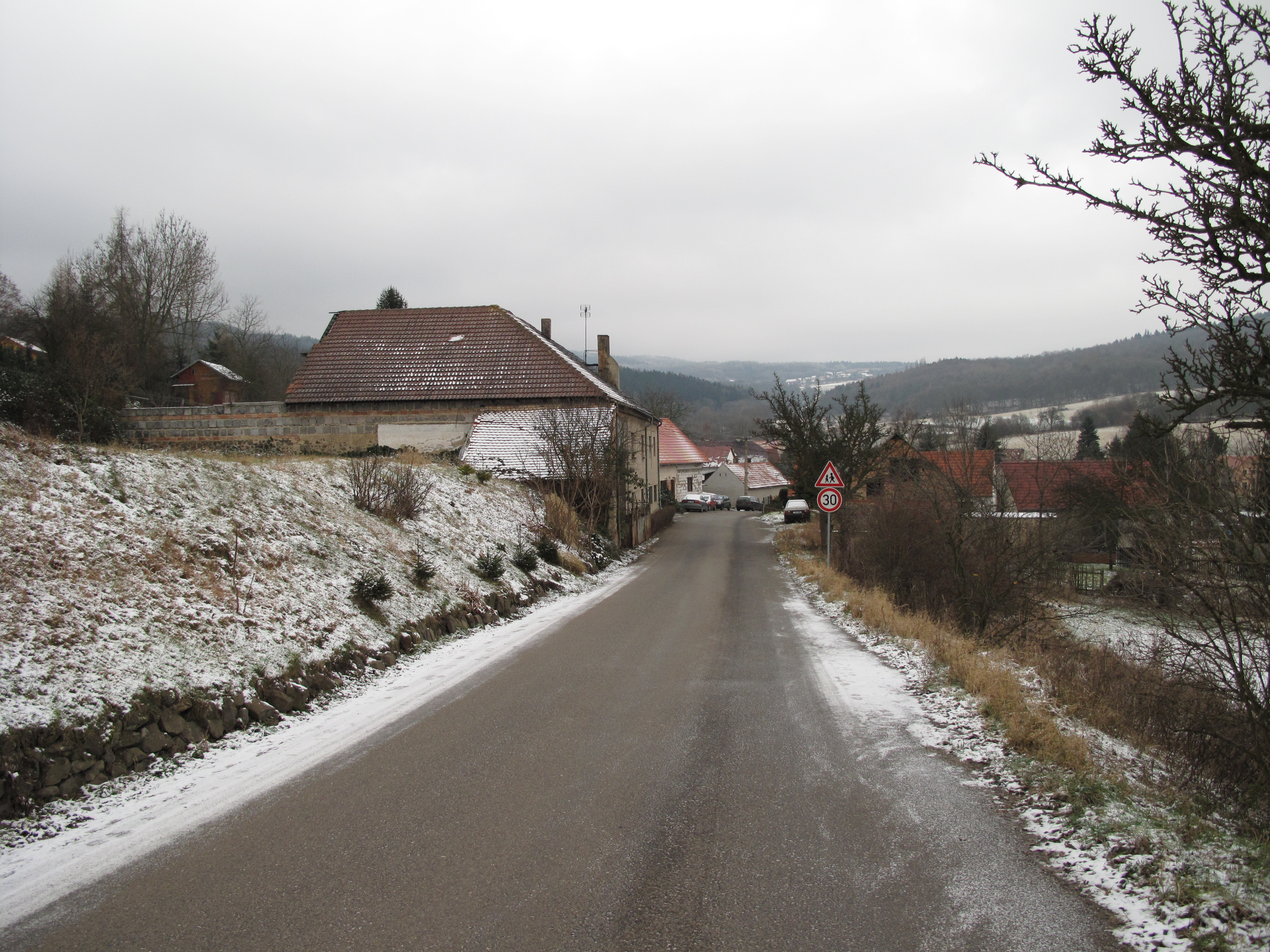 Silnice ve Starém. Okres Litoměřice, Česká republika.